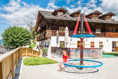 Fotographie des Ederhofs vom Spielplatz aus.